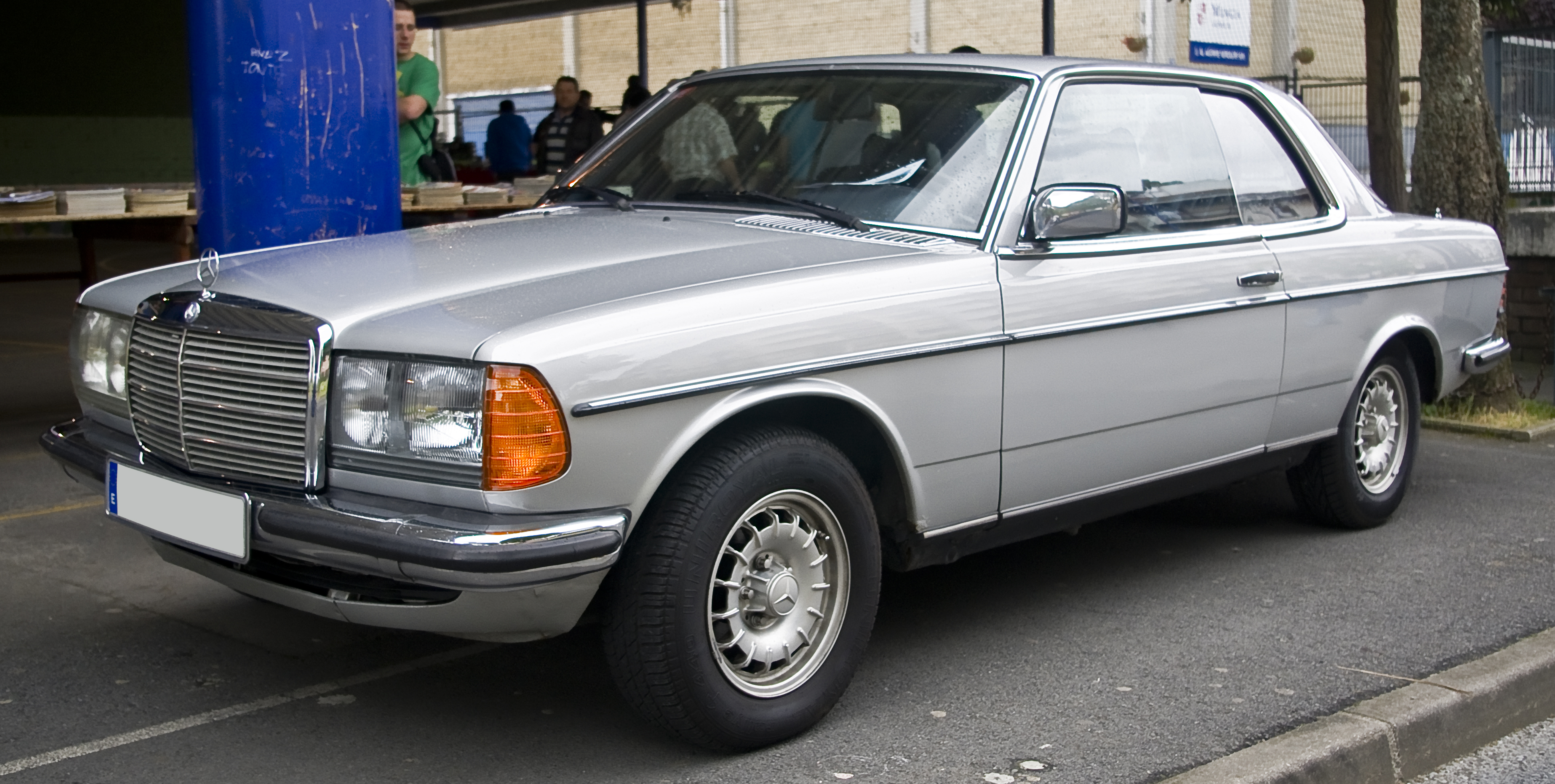 Mercedes-Benz 280CE [C123]